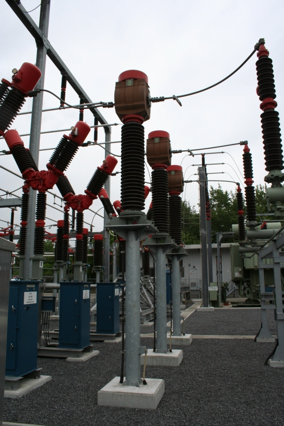 Een stroomtransformator in een 150 kV lijn, ELIA opleidingspost Edison